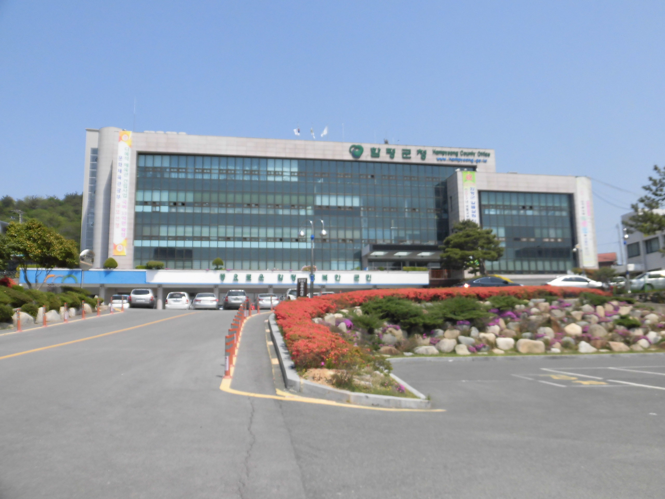 전라남도 함평군에 있는 함평군청 全羅南道咸平郡にある咸平郡庁